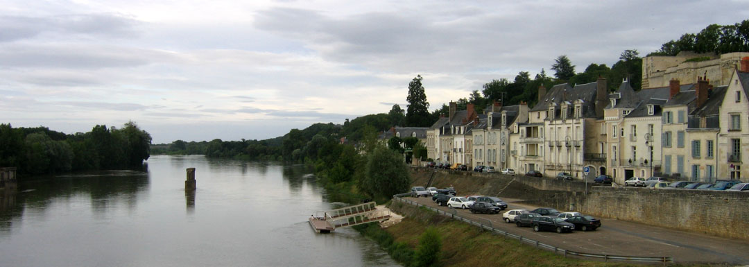 Amboise et la Loire, Indre-et-Loire, Touraine